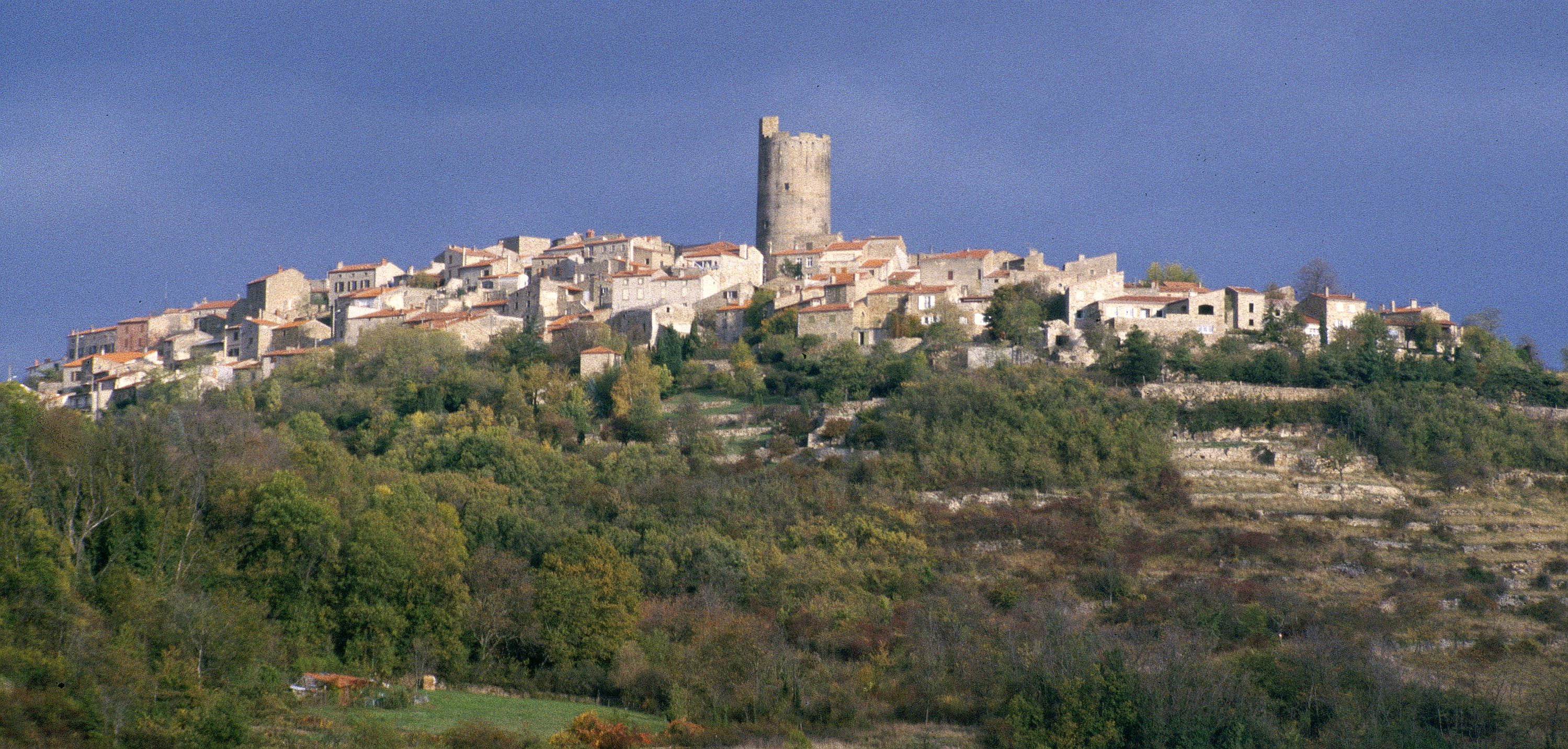 Montpeyroux (Puy-de-Dôme)